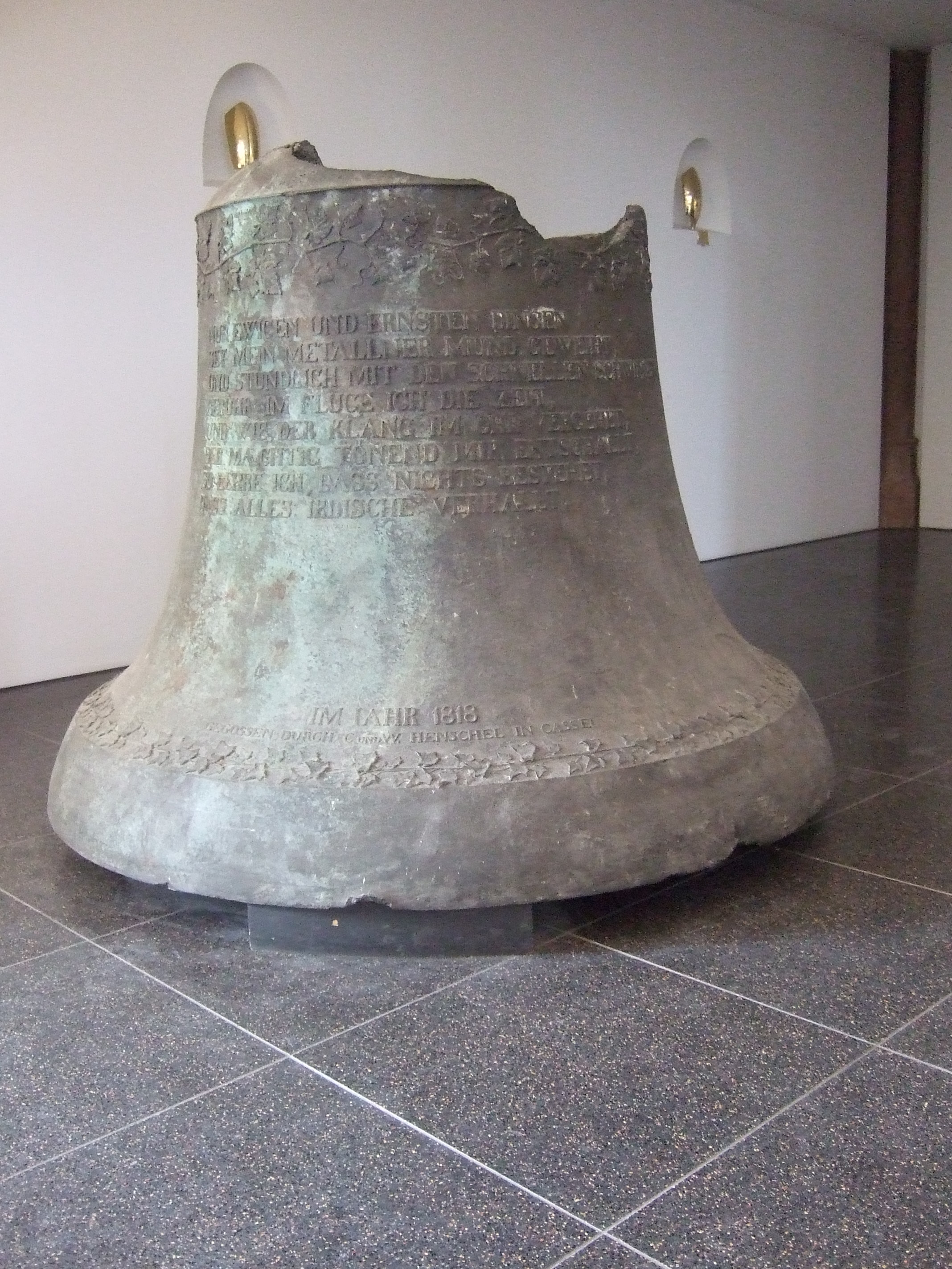 Alte Osannaglocke Martinskirche 2017